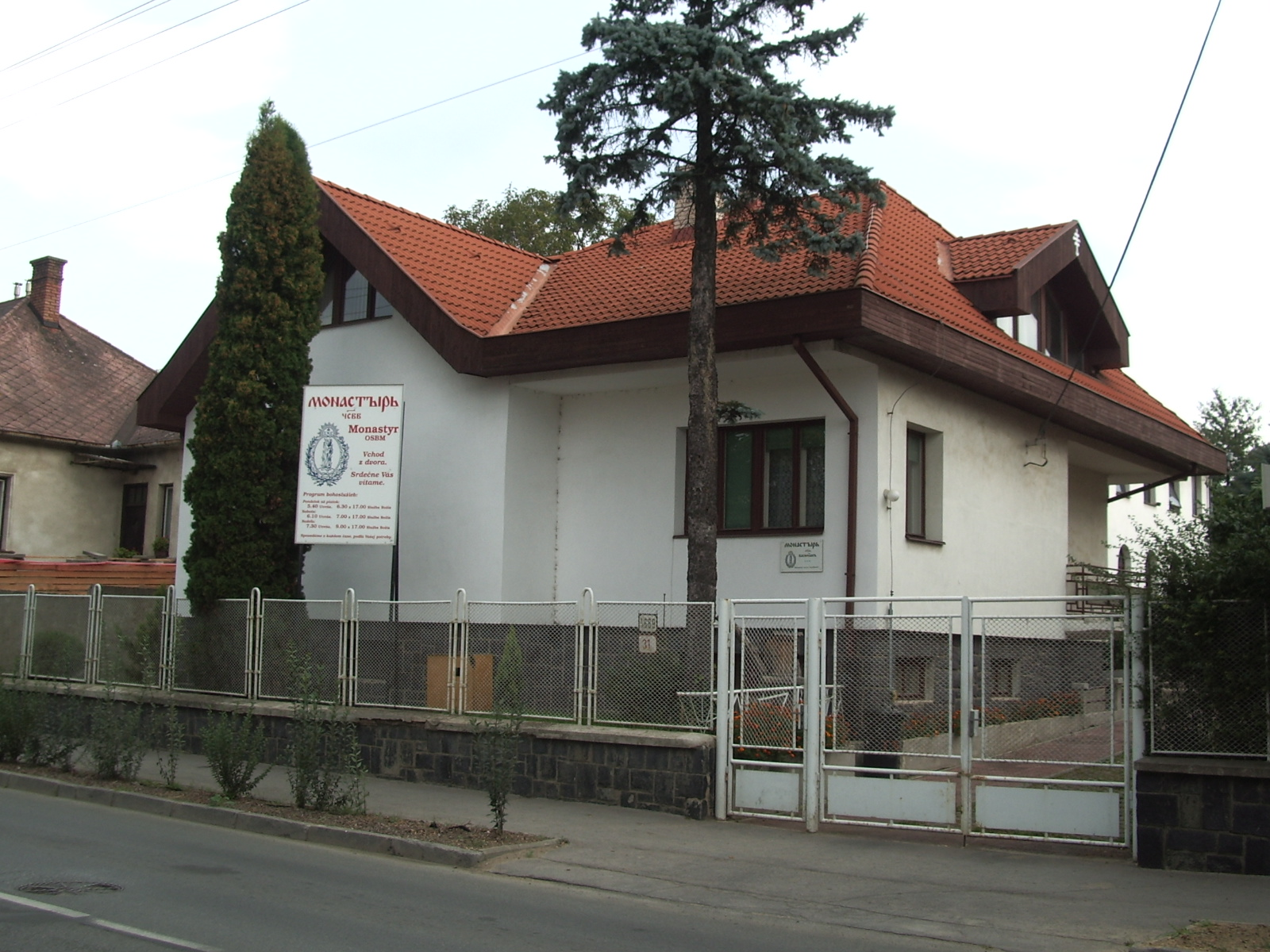 Monastier oo. baziliánov v Prešove, Vajanského 31 v r. 2005. Photo taken by Jozafát Vladimír Timkovič, OSBM